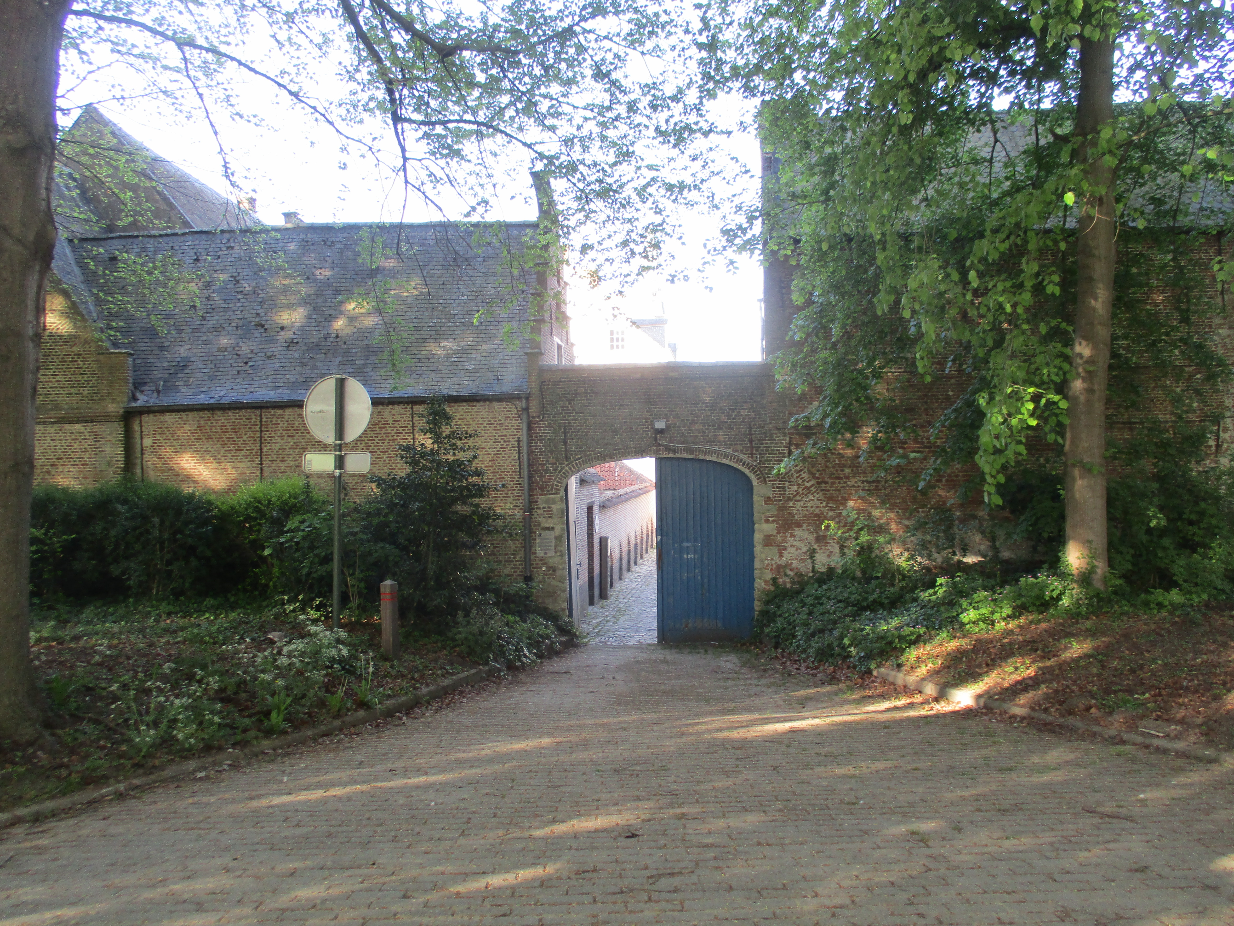 Ingang begijnhof Lier via de vesten